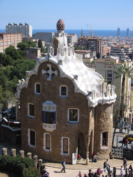 Construcción vista desde el mirador del Parc Güell.